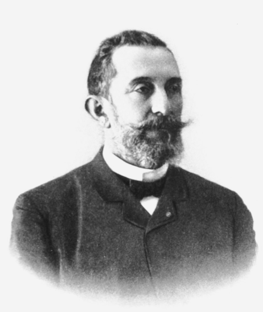 Albert Pitres (1848-1928)